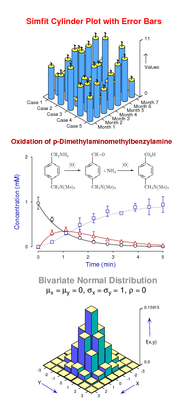 Ejemplos de representaciones gráficas con SimFIT